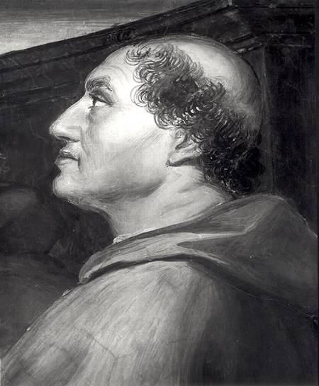 Рафаэль Риарио